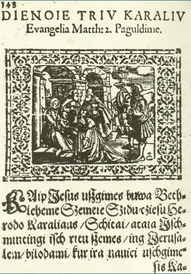 Jono Bretkūno Postilė. Postil of Jonas Bretkūnas